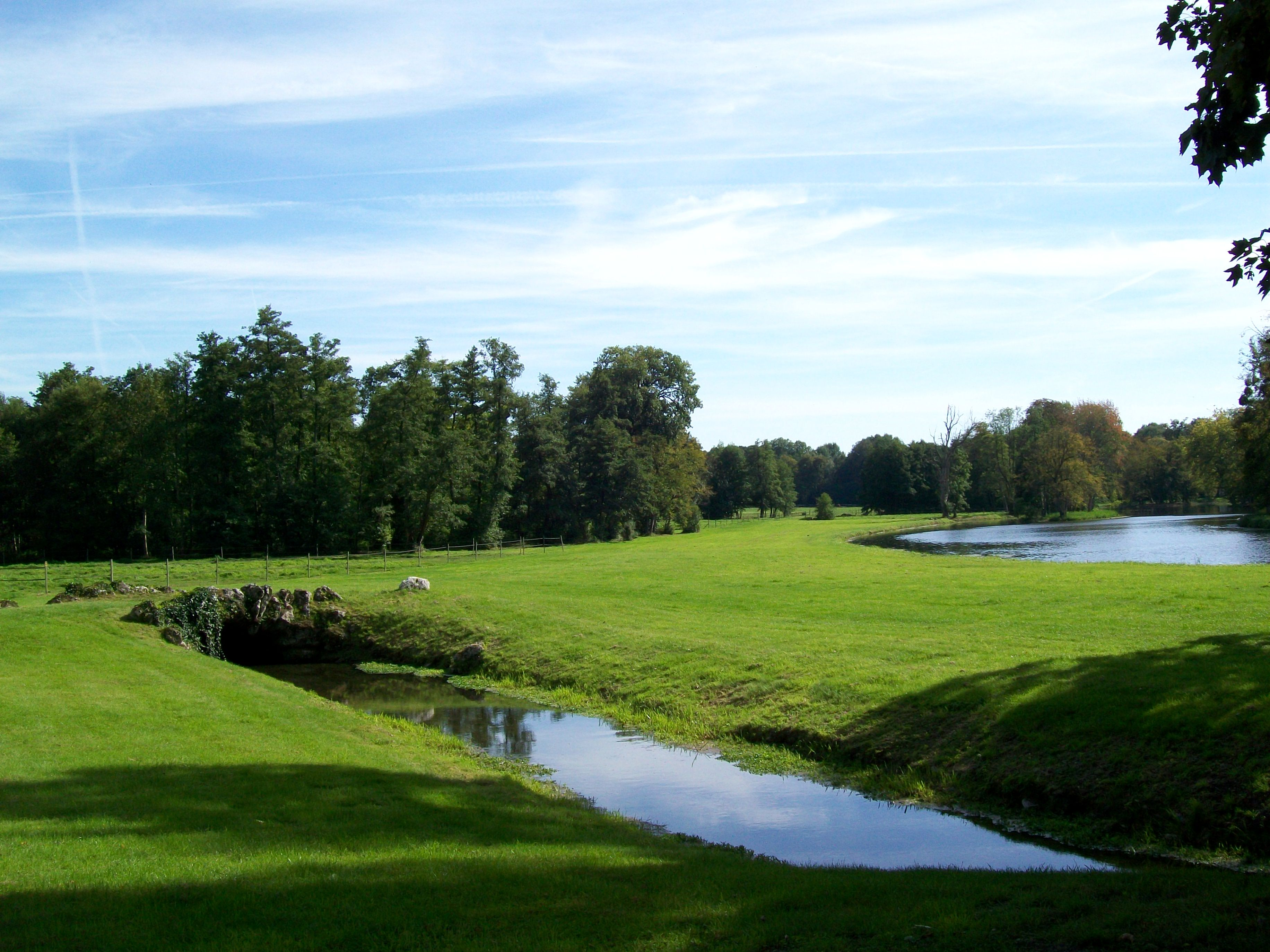 Abbaye de la Victoire à Senlis (Oise), parc paysager à l'anglaise des années 1830 ; il ne subsiste que dans ses grandes lignes.